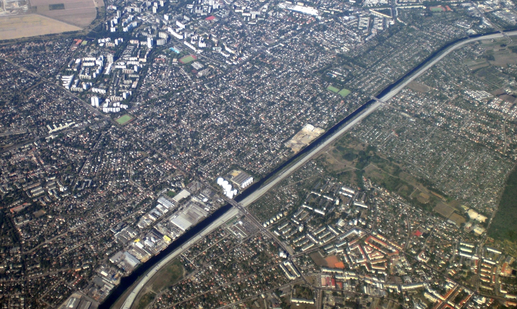 site of former power plant Berlin-Rudow at Teltow Kanal in Berlin, Germany